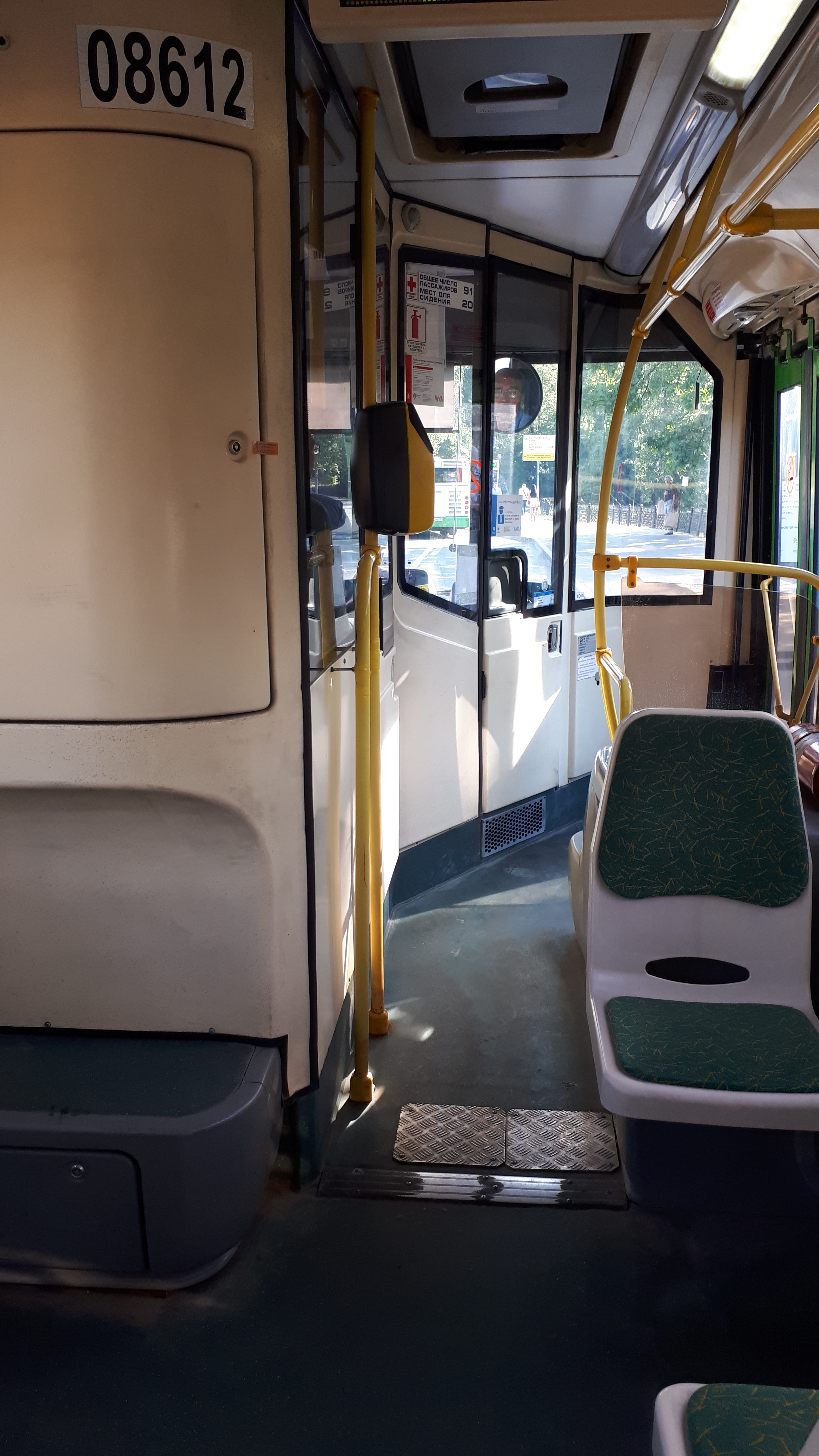 Кабина водителя-ученика, продлённая кабиной инструктора.